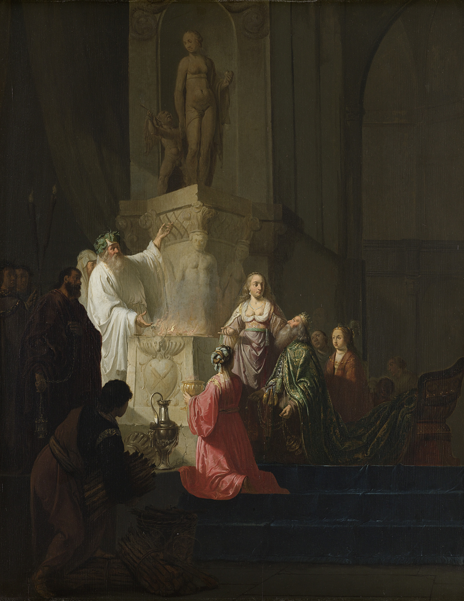 De afgoderij van koning Salomo. Tempelinterieur waarin koning Salomo, omringd door enkele vrouwen, knielt voor een altaar waar wierook gebrand wordt. Links staat een priester in wit gewaad, wijzend naar een beeldengroep van Venus en Cupido. Op de voorgrond bengt een man bundels brandhout.